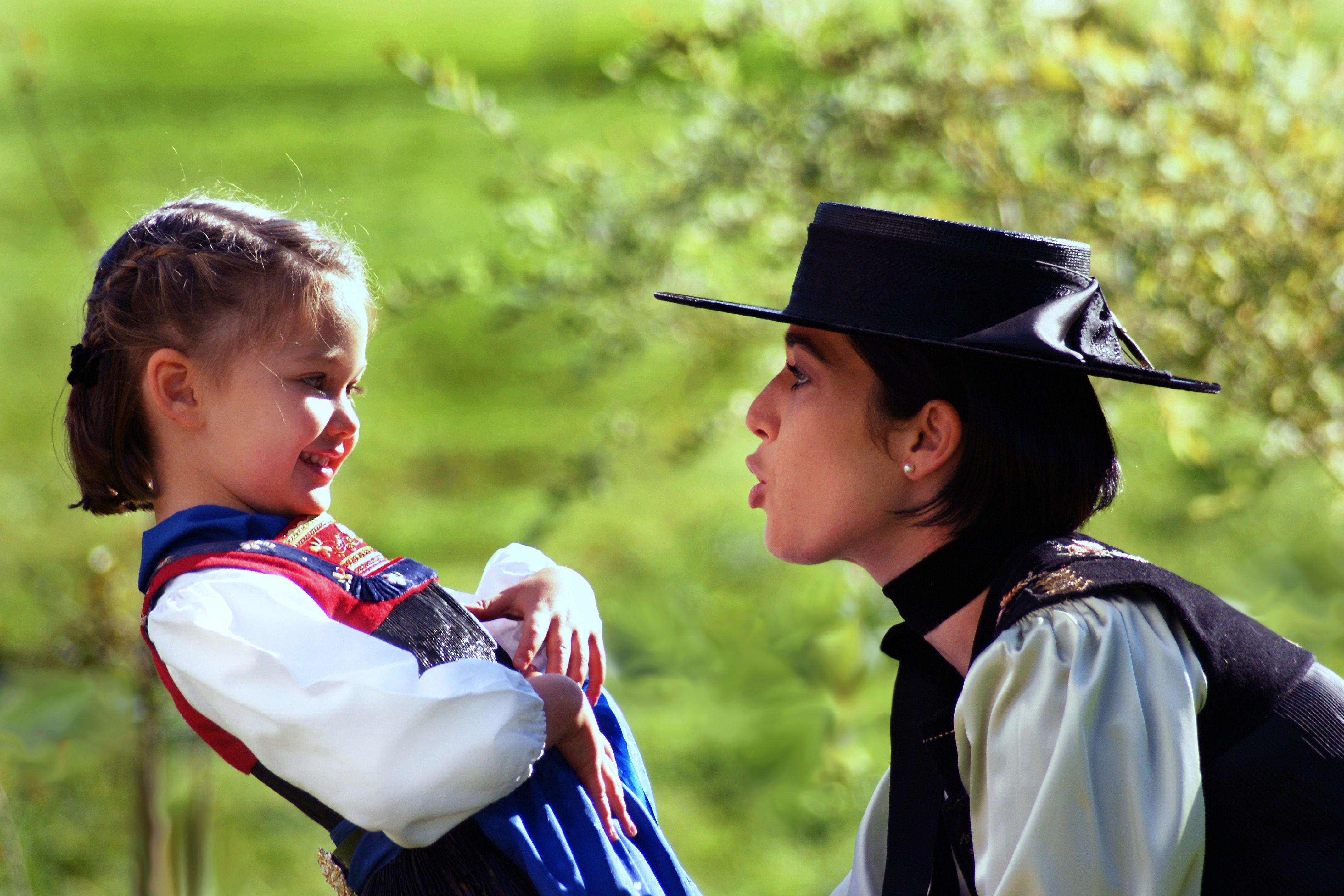 Die Merkmale der Bregenzerwälder Frauentracht (der Juppe) sind, die silberne Schnalle, der "Bleotz", welcher kunstvoll mit gold-silbernen Stickereinen versehen ist, der "Keadoro", ein kunstvoll goldsilberner bestickter Zierstreifen am Rücken und die verschiedenen Kopfbedeckungen. Sie sind ein ganz besonderes Markenzeichen der Wäldertracht. "Spitzkappe (für den Kirchgang)", "Brämokappo (Pezlkappe aus Seehundfell)", "Stuoz", "Stucho (weisses Haartuch für die Trauer)", "Schäohut (Strohhut, Sommer)", "Kauffmannhut (Filzhut, Übergangszeit)" und als Meisterstück das "Schappale (Trachtenkrönele, Krönchen oder Flitterkrone)".